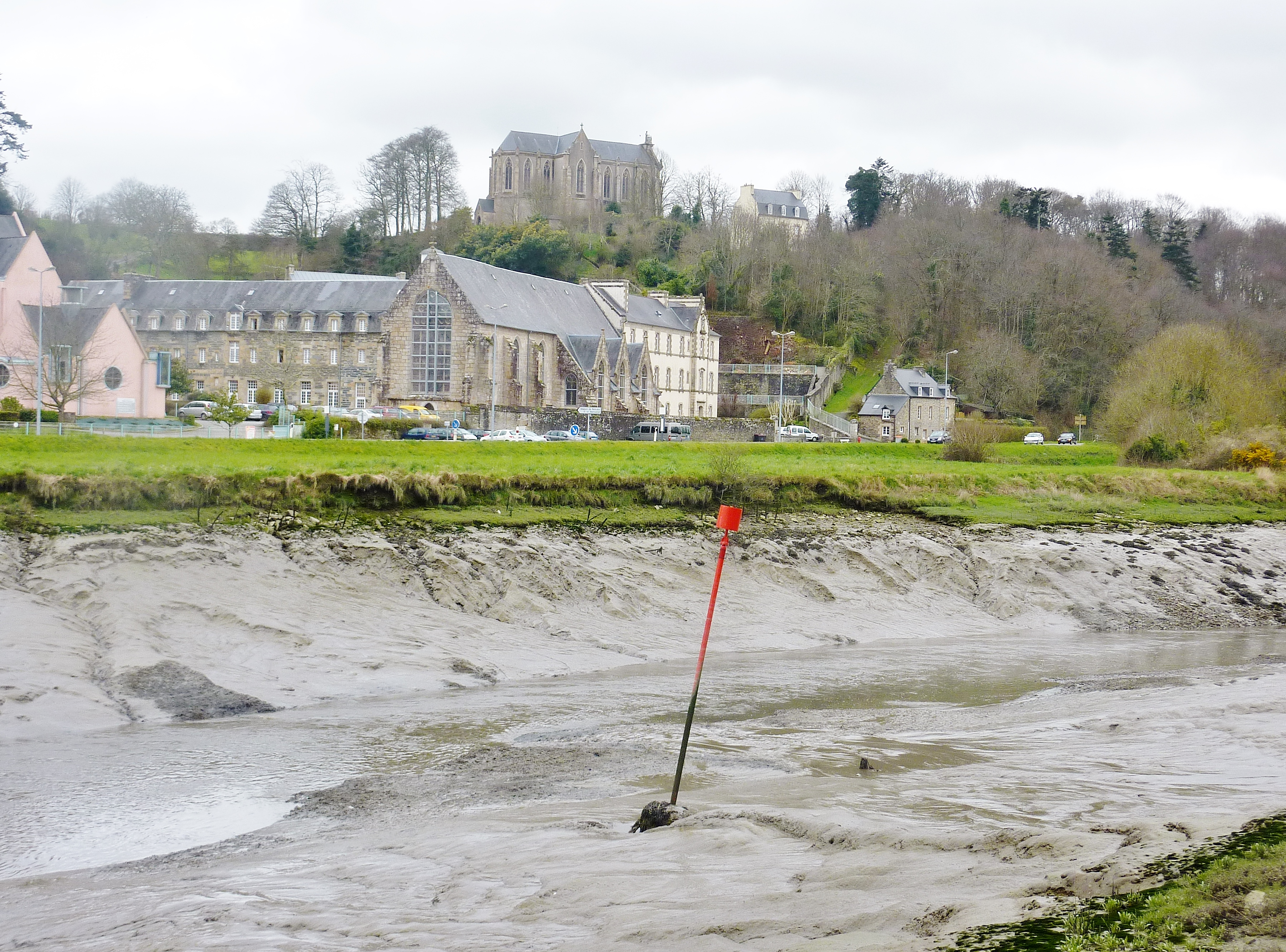 Saint-Martin-des-Champs (Finistère) : la Rivière de Morlaix (à marée basse), le couvent Saint-François de Cuburien et (en haut) l'église Notre-Dame de La Salette